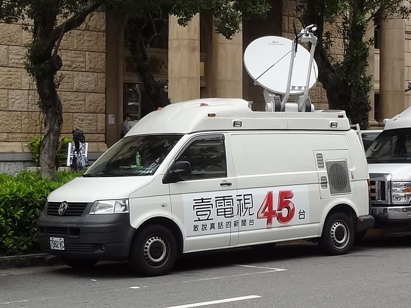 中文（台灣）: 壹電視新聞台SNG車7982-VC。